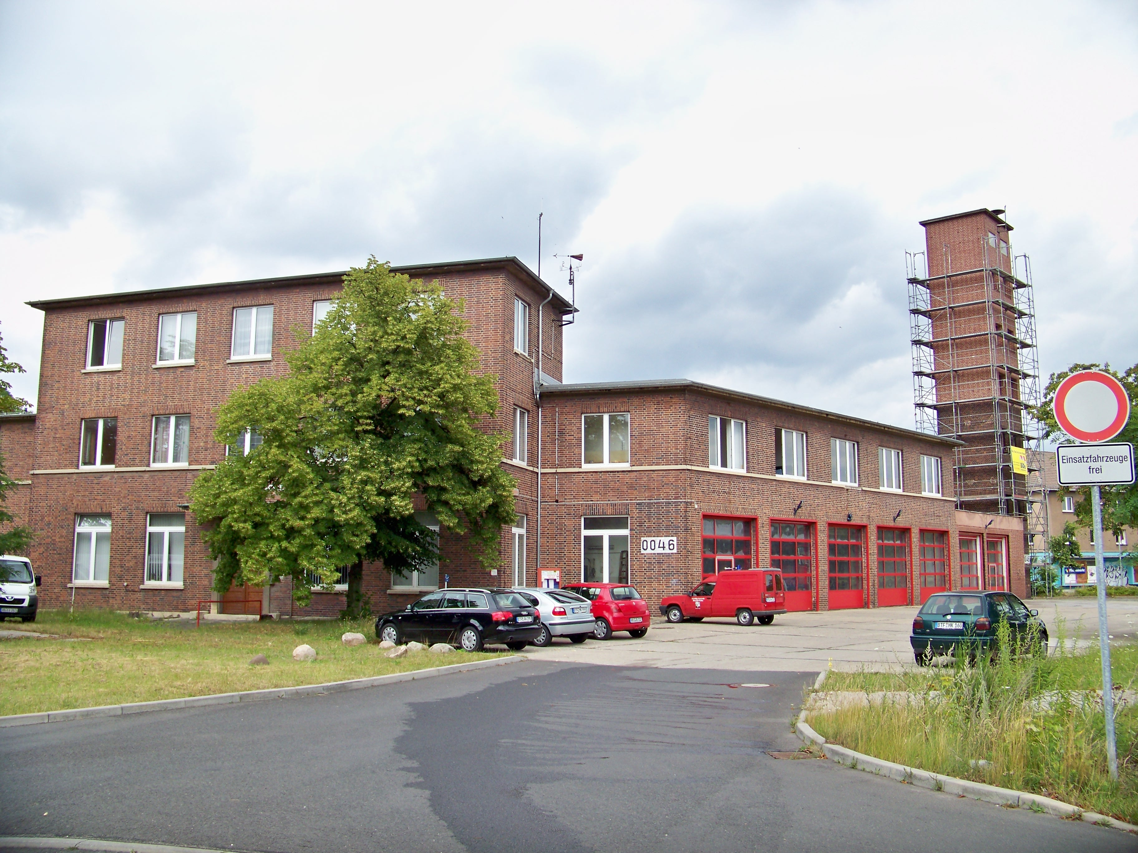 Feuerwehr in Wolfen, Nähe ehemalige Filmfabrik Wolfen, vermutlich früher Werksfeuerwehr der Filmfabrik